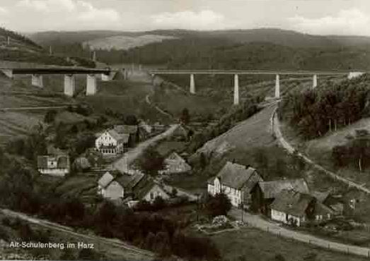 Unterschulenberg vor der Flutung 1956.